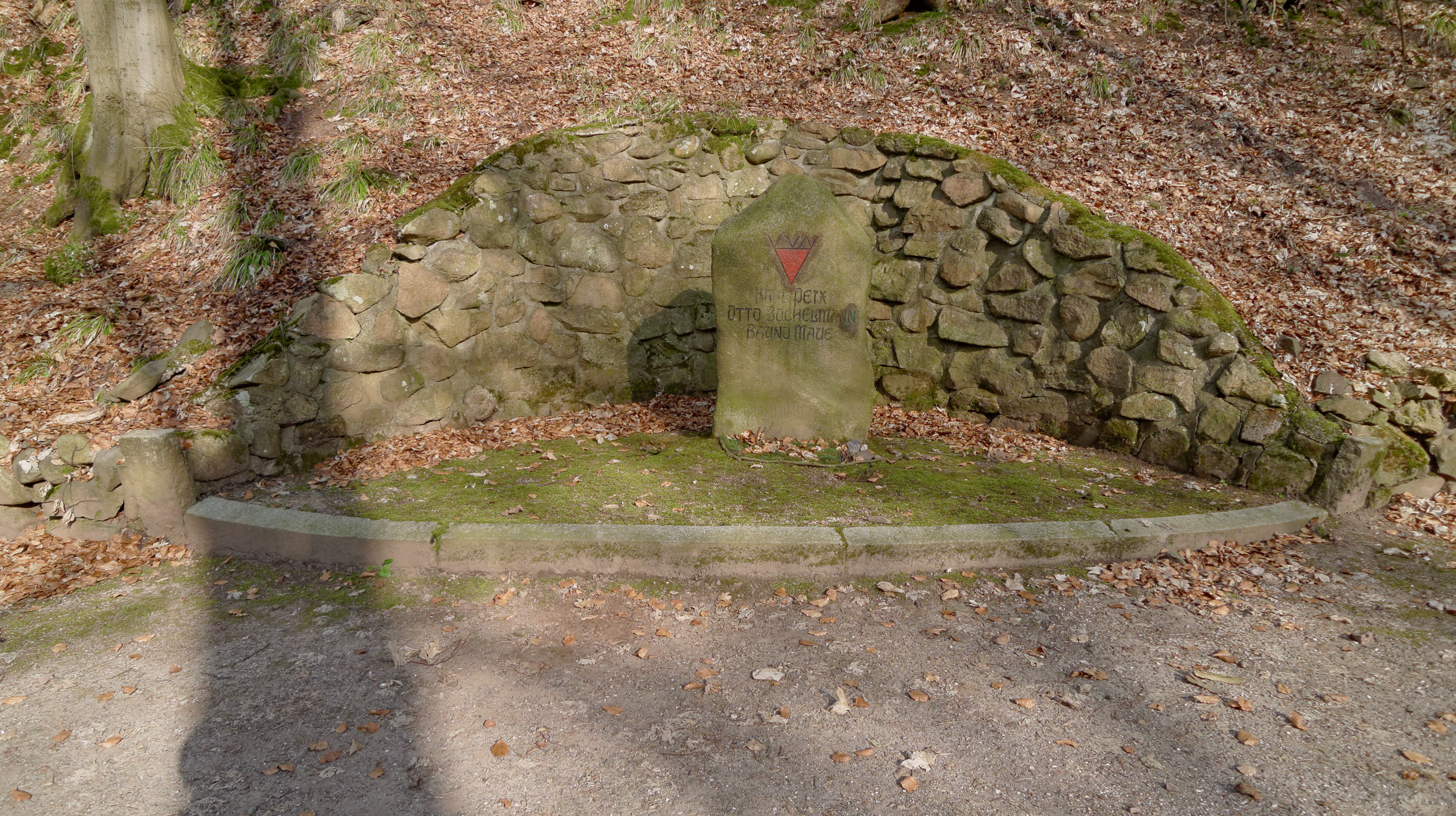 Denkmal für Karl Peix, Otto Bockelmann und Bruno Maue am südlichen Rand des Kurparks von Bad Lauterberg